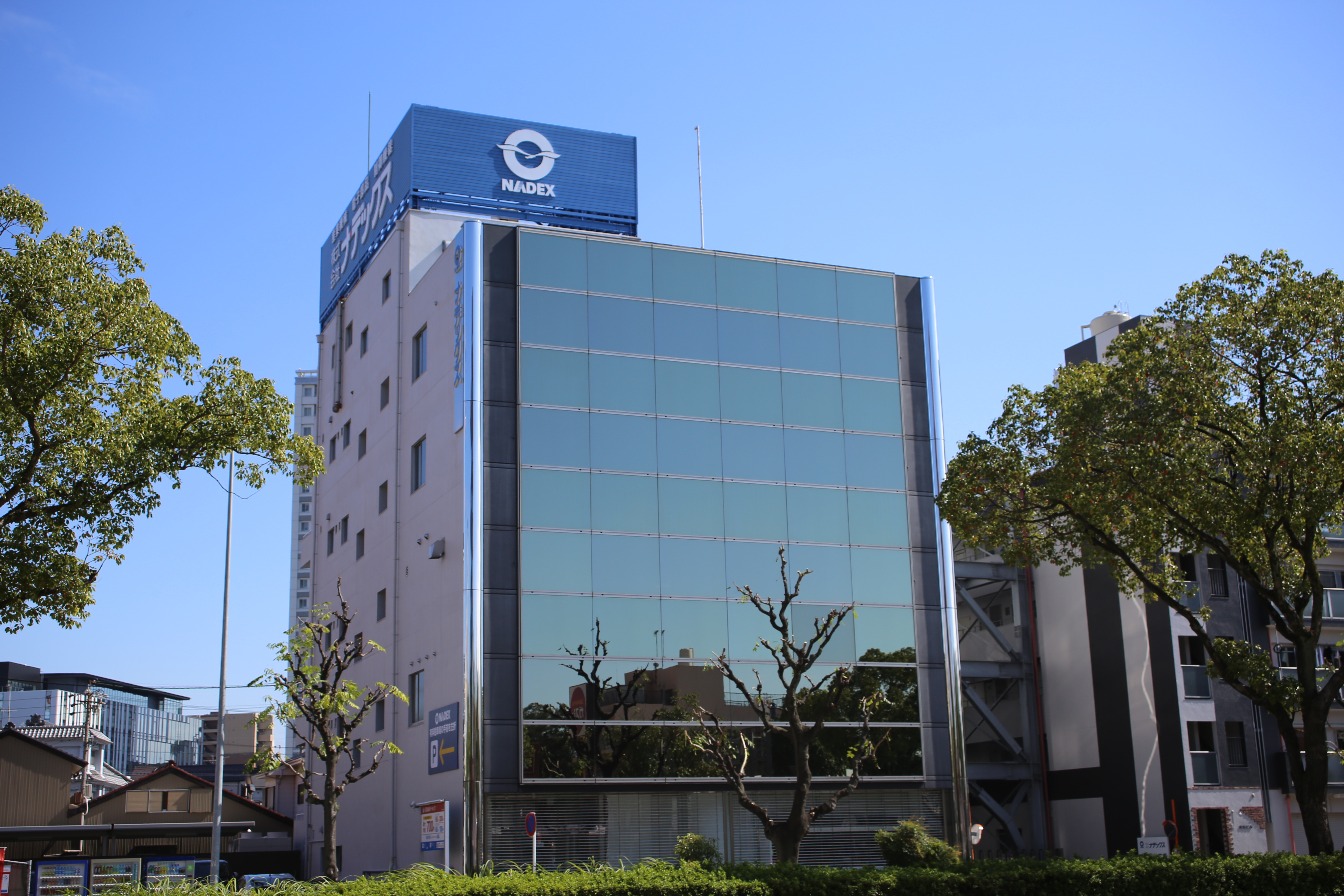 名古屋市中区古渡町のナ・デックス本社を西側公道北側より撮影